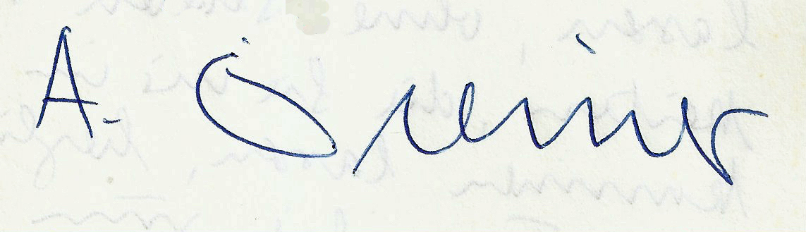 Alwin Diemer. Signatur seines handgeschriebenen Briefes an mich vom 4.1.1964